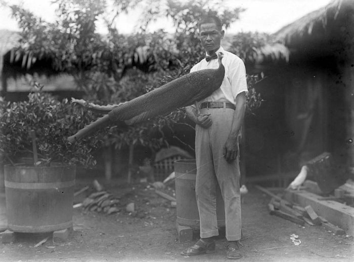 Repronegatief. De argusfazant kwam op vele plaatsen in Borneo voor. De vogel was over het algemeen te vinden in droge bossen op vlakke terreinen, heuvels en bergen. Hier trof men zijn schoongemaakte dansplaatsen aan. De dieren zijn zeer schuw. Desondanks zagen de Dajaks kans ze te vangen in hun strikken, zowel voor hun vlees als voor hun fraaie staartveren die gebruikt werden voor hun ceremoniële tooi. De veren werden zelfs uitgevoerd naar Singapore vanuit Pontianak in Borneo's Westerafdeling. De argusfazant was in de jaren dertig nog vrij algemeen in de bossen te vinden. (P. Boomgaard, 2001). Een tamme argusfazant